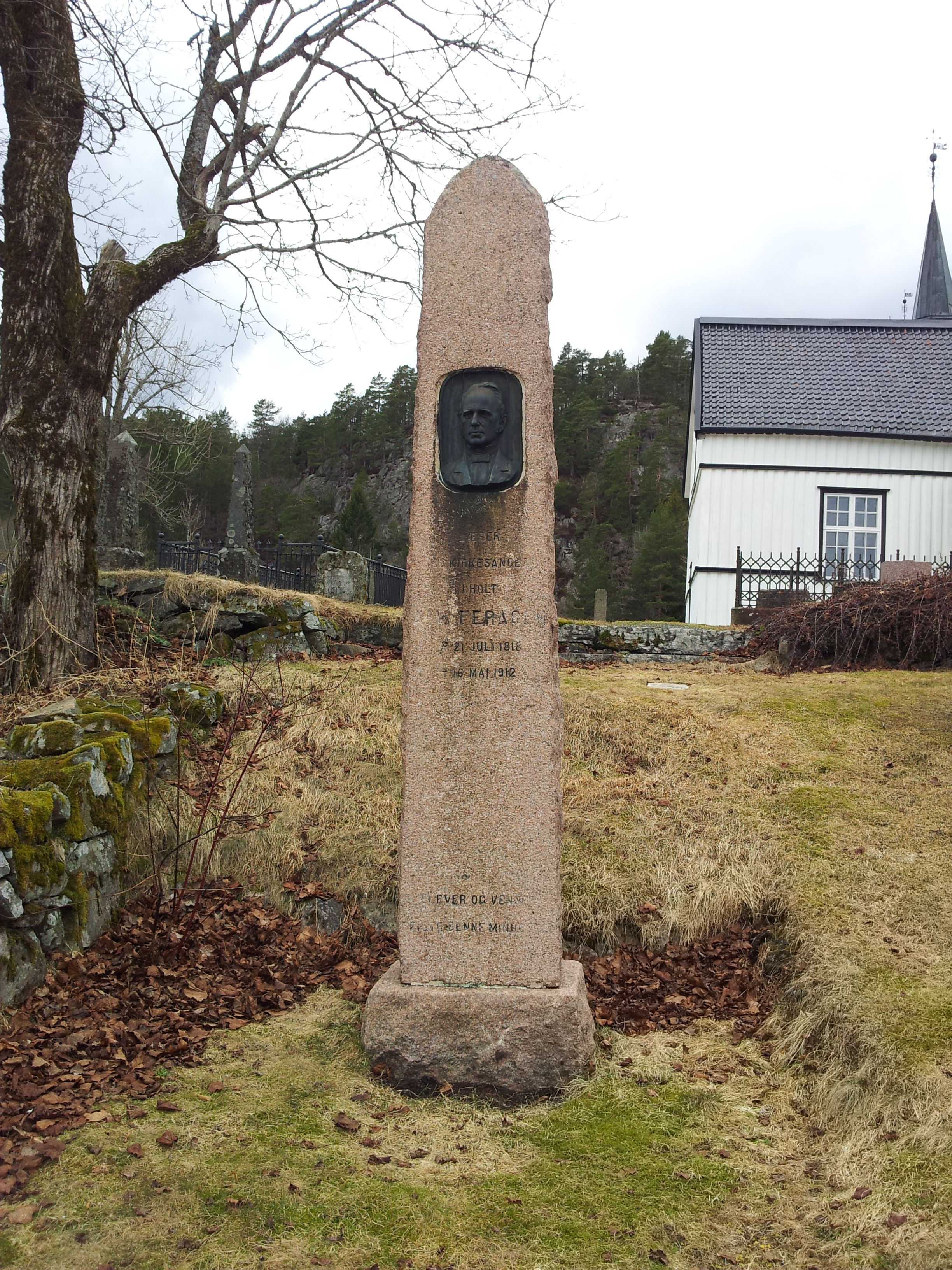 Gravsten til Andreas Feragen på Holt kirkegård i Holt, Tvedestrand